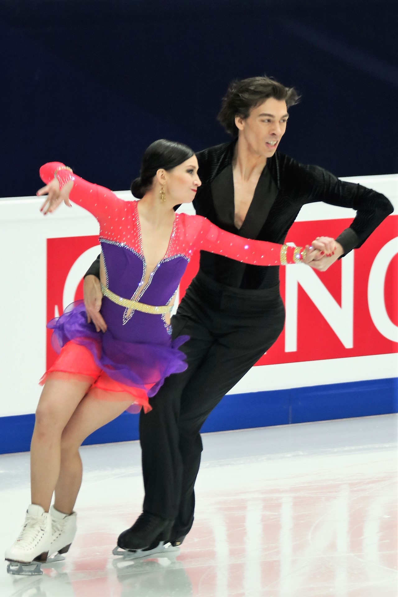 Люция Мысливечкова / Лукаш Цолли (Словакия) на Чемпионате Европы по фигурному катанию 2018.